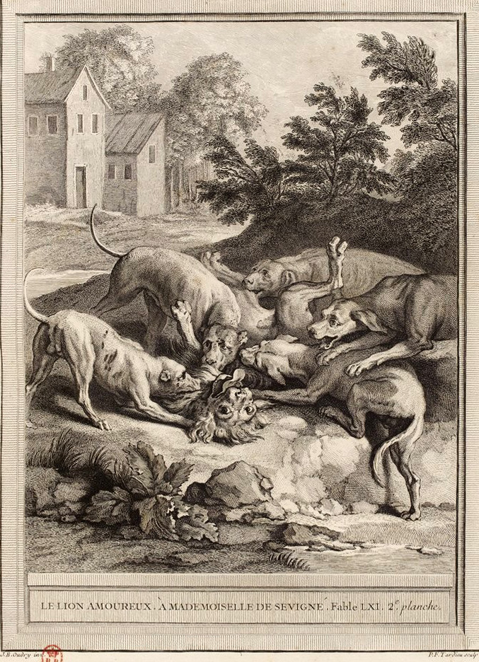 Gravure réalisée par Pierre François Tardieu d'après un dessin de Jean-Baptiste Oudry représentant la fable Le Lion amoureux de Jean de La Fontaine (fable 1 du livre IV). Cette gravure est parue dans l'édition complète des fables de La Fontaine, parue en quatre tomes chez l'éditeur Desaint & Saillant, rue saint Jean de Beauvais à Paris, 1755-1759.